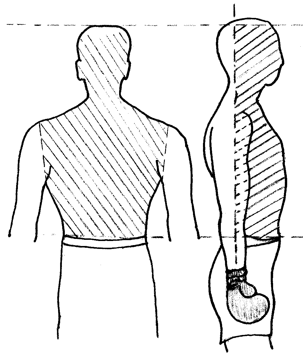 cibles.jpg